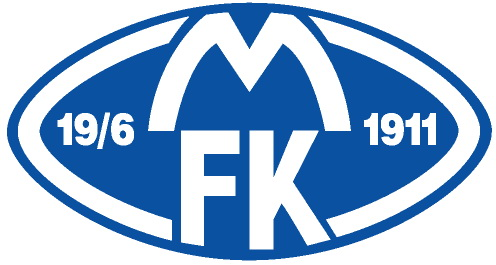 MFK logo